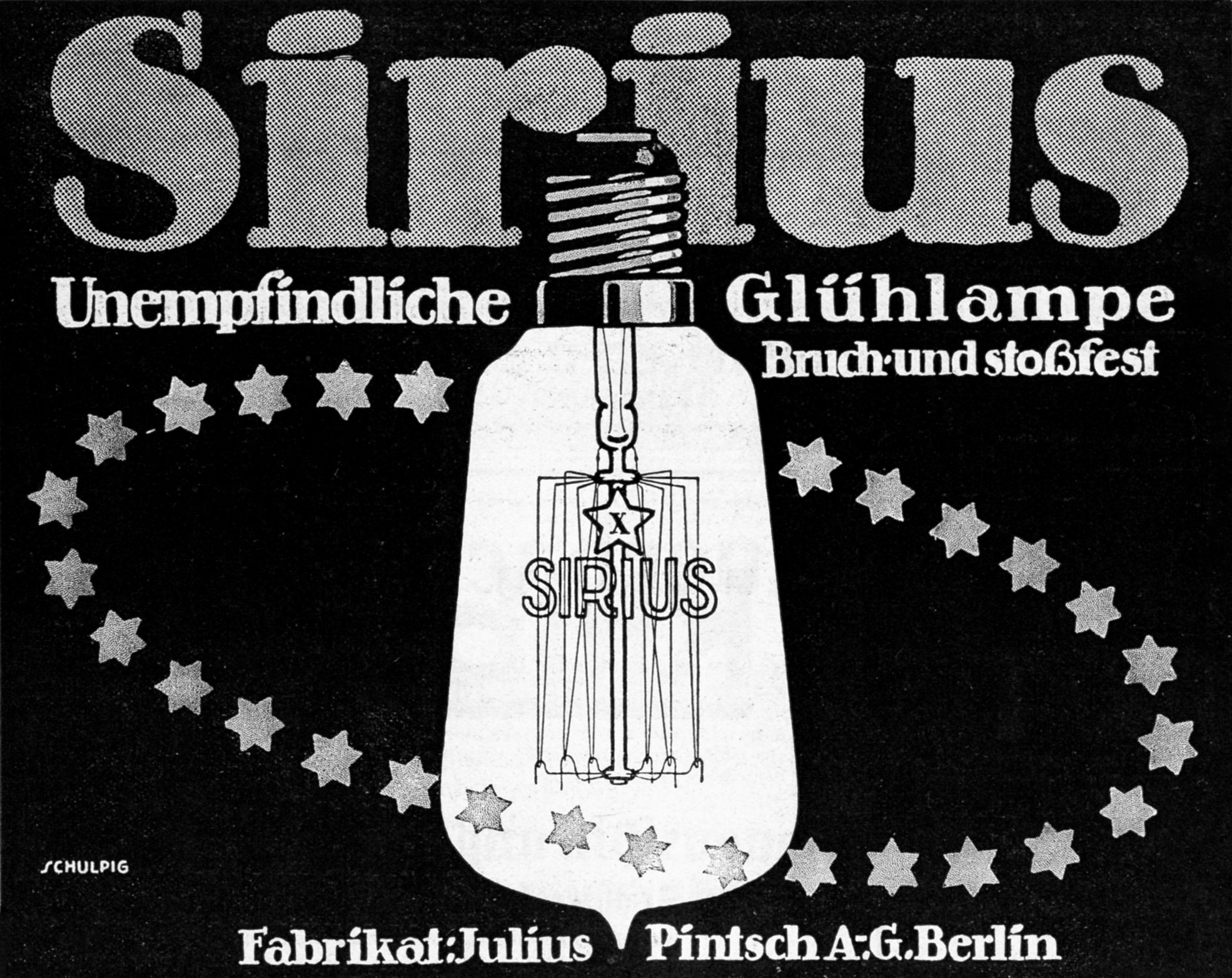 Werbeanzeige der Julius Pintsch A.-G. für Sirius-Glühlampen